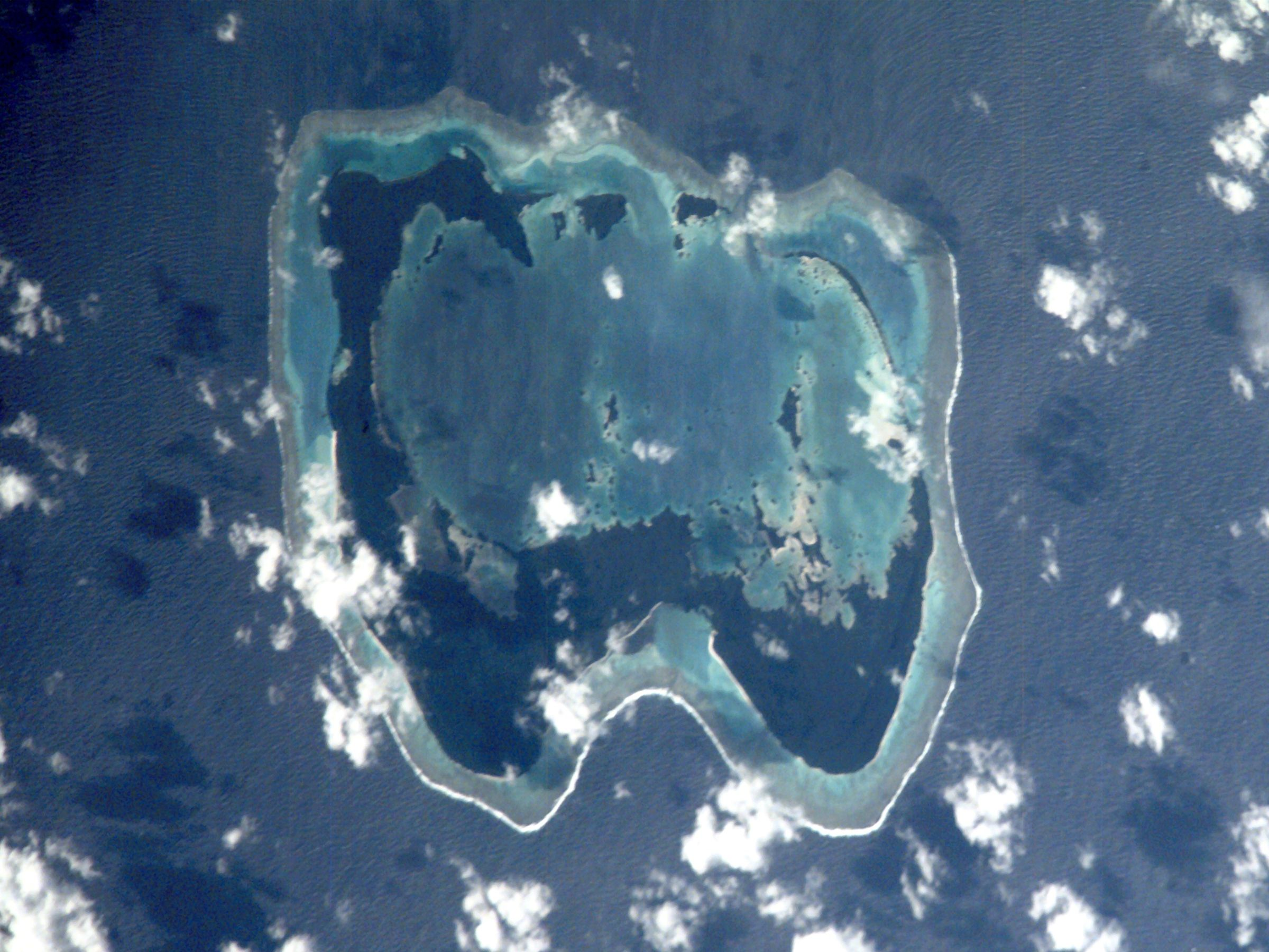 Fulaga